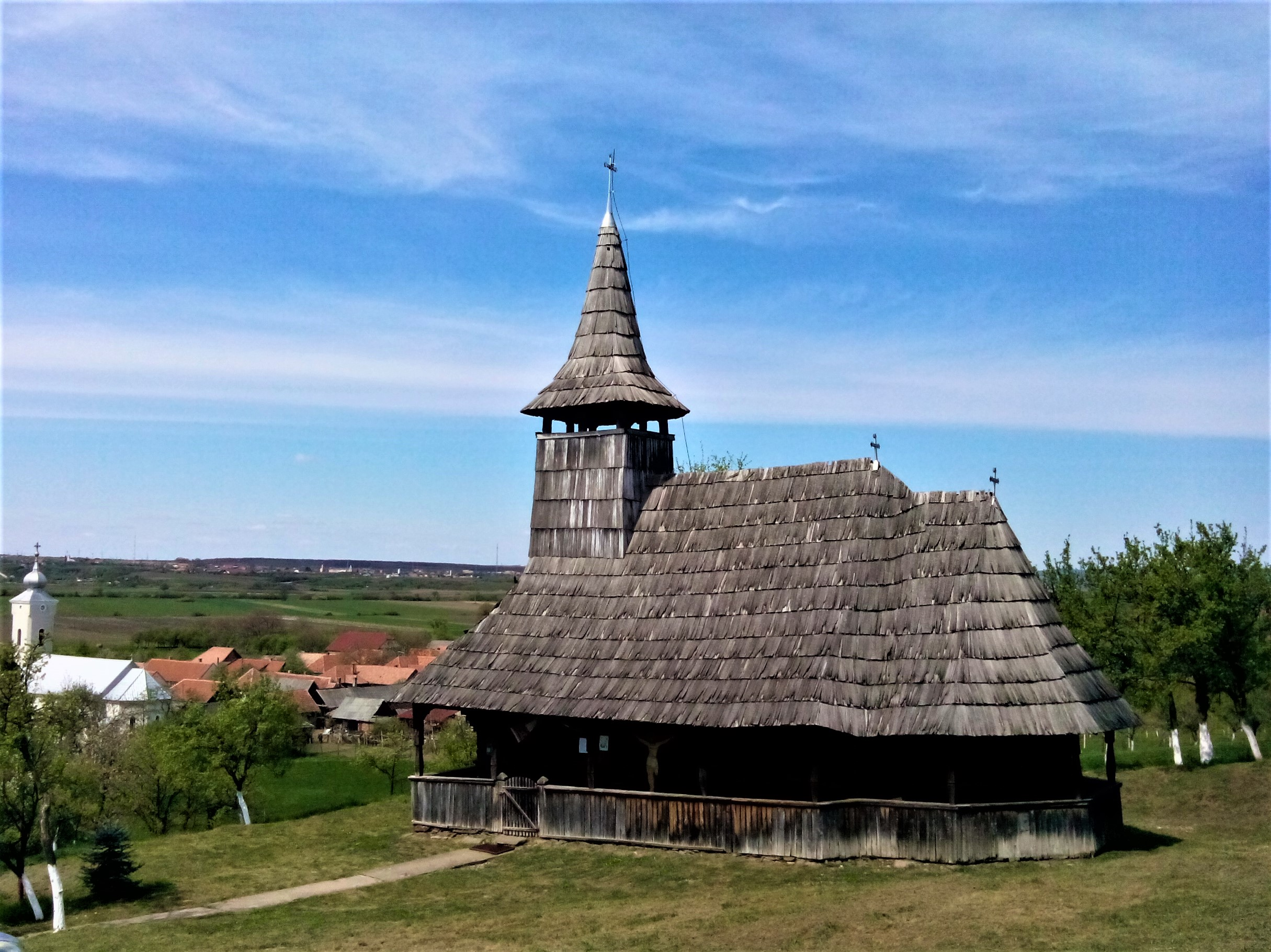 Biserica de lemn din satul Porț, județul Sălaj